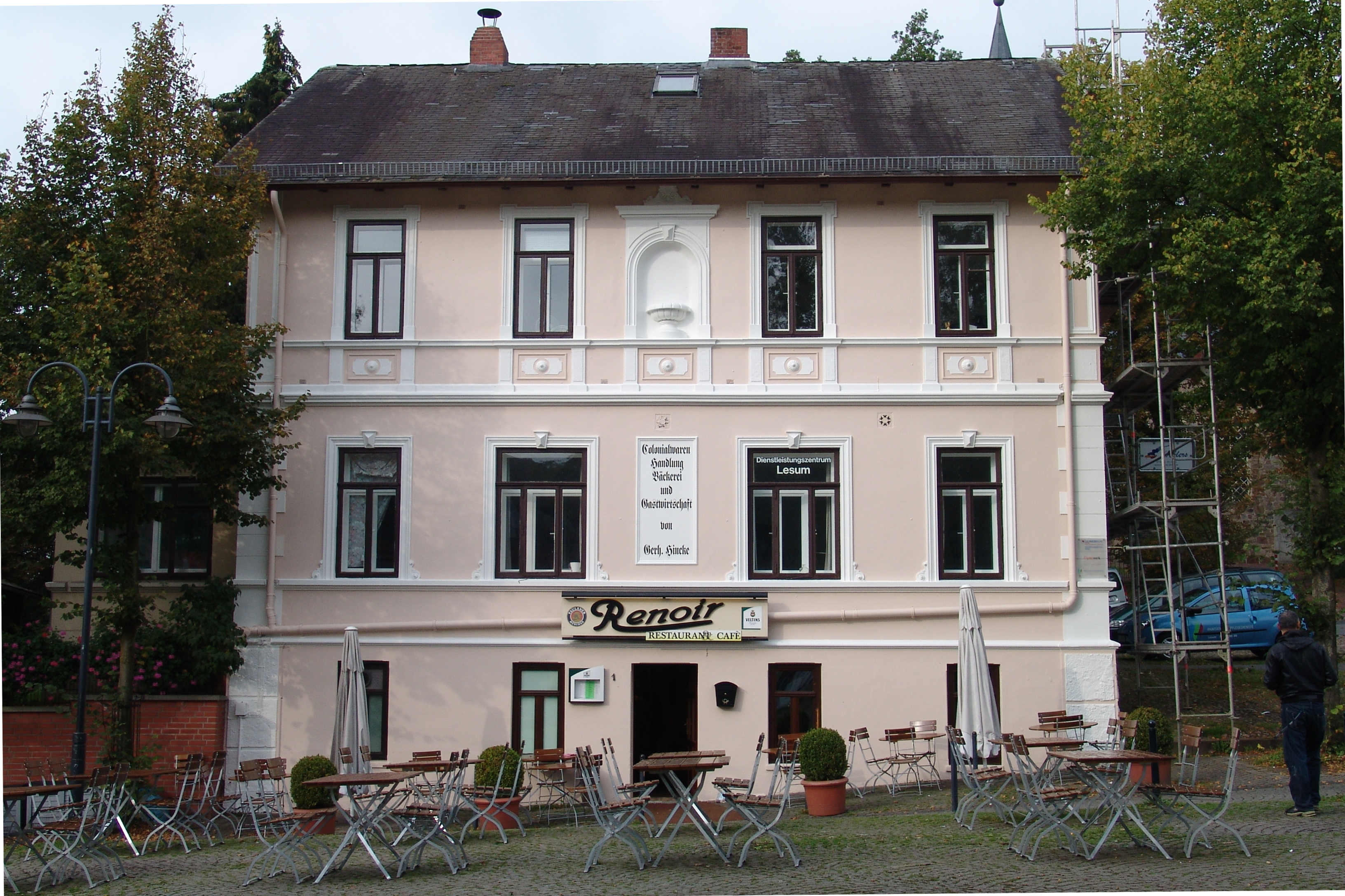 Bäckerei und Gastwirtschäft Hincke in Bremen, An der Lesumer Kirche 1.Das abgebildete Objekt ist ein geschütztes Kulturdenkmal in der Freien Hansestadt Bremen, mit der Nr. 1904 beim Landesamt für Denkmalpflege registriert.